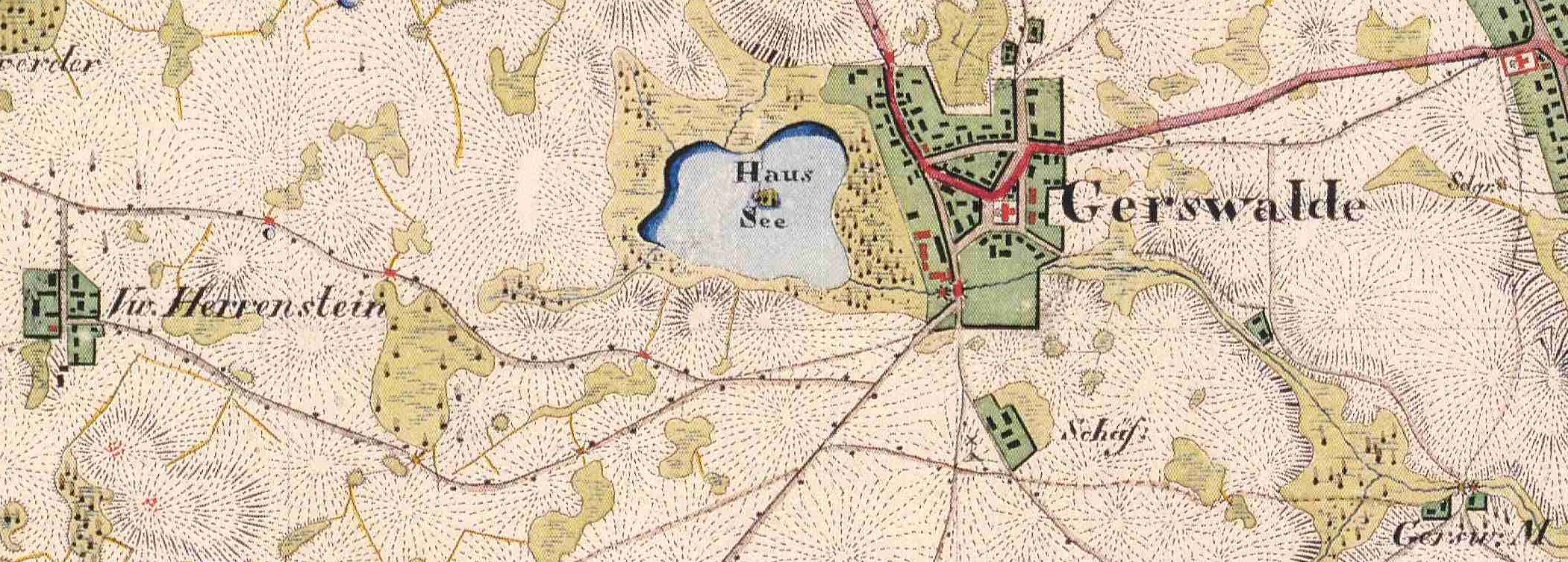 Gerswalde und Herrenstein, Gem. Geswalde, Lkr. Uckermark, Brandenburg, Ausschnitt aus dem Urmesstischblatt 2848 Gerswalde von 1826